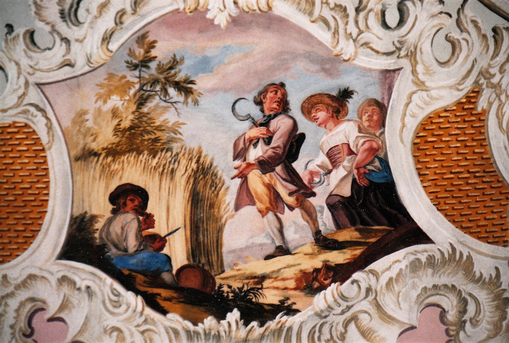 Fresko in St. Rasso (Untergammenried) - Der heilige Rasso hilft bei Gefahren der 4 Elemente – Erde: Er verhilft zu einer guten Ernte (1747)